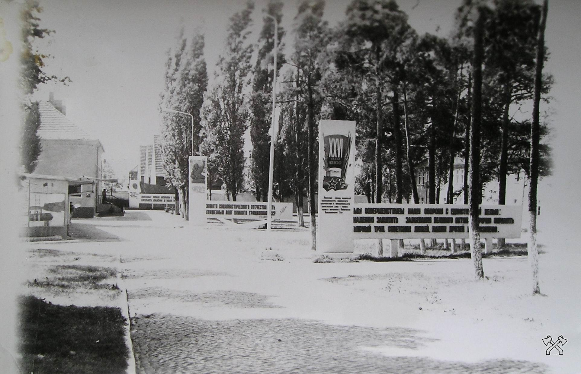 Аллея полка (от КПП к штабу)